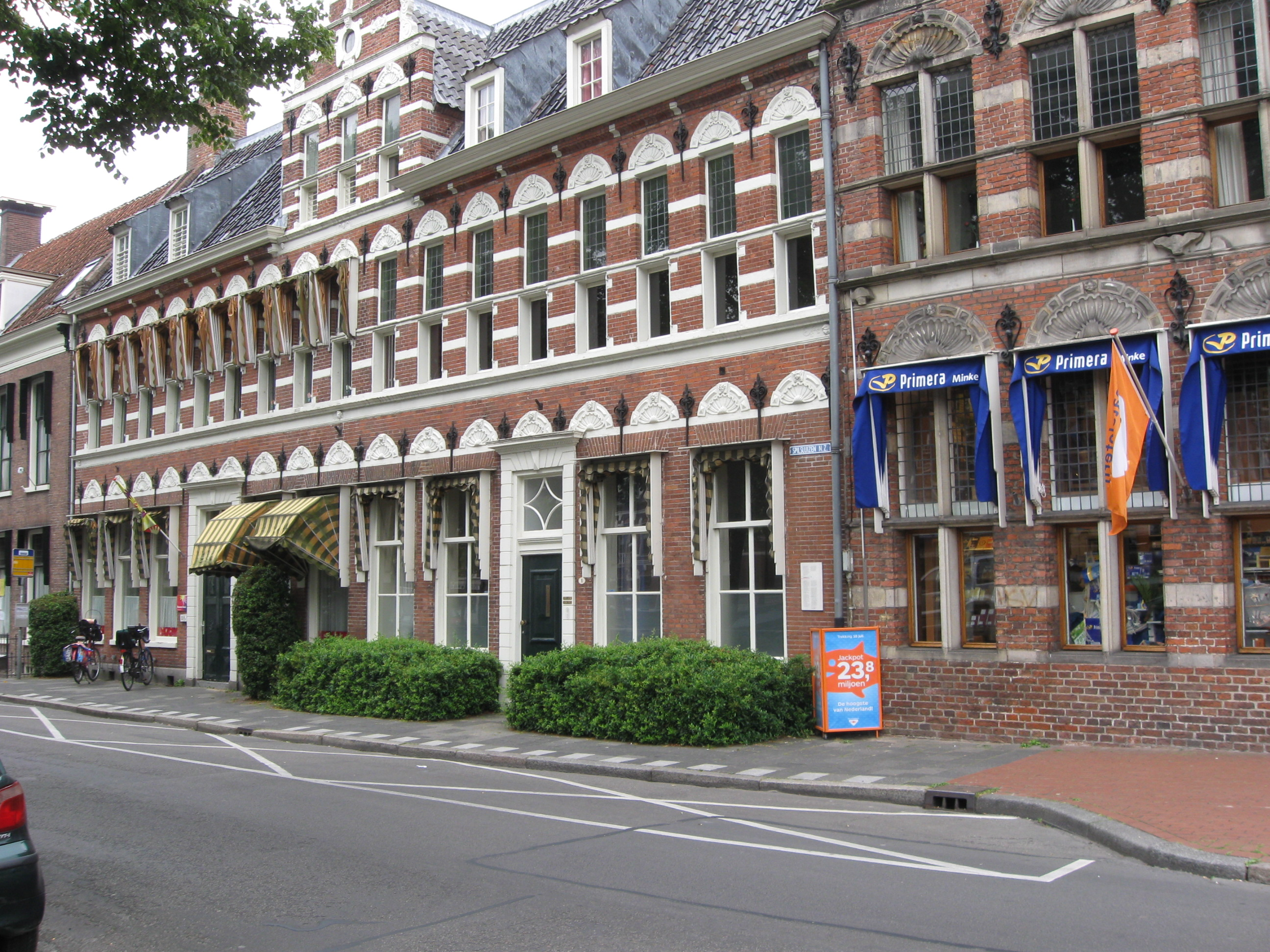 De voorgevels van Spilsluizen 1-3 (links, 1631, rm 18686) en de zijgevel van Nieuwe Ebbingestraat 2 (1622, rm 18580) in Groningen